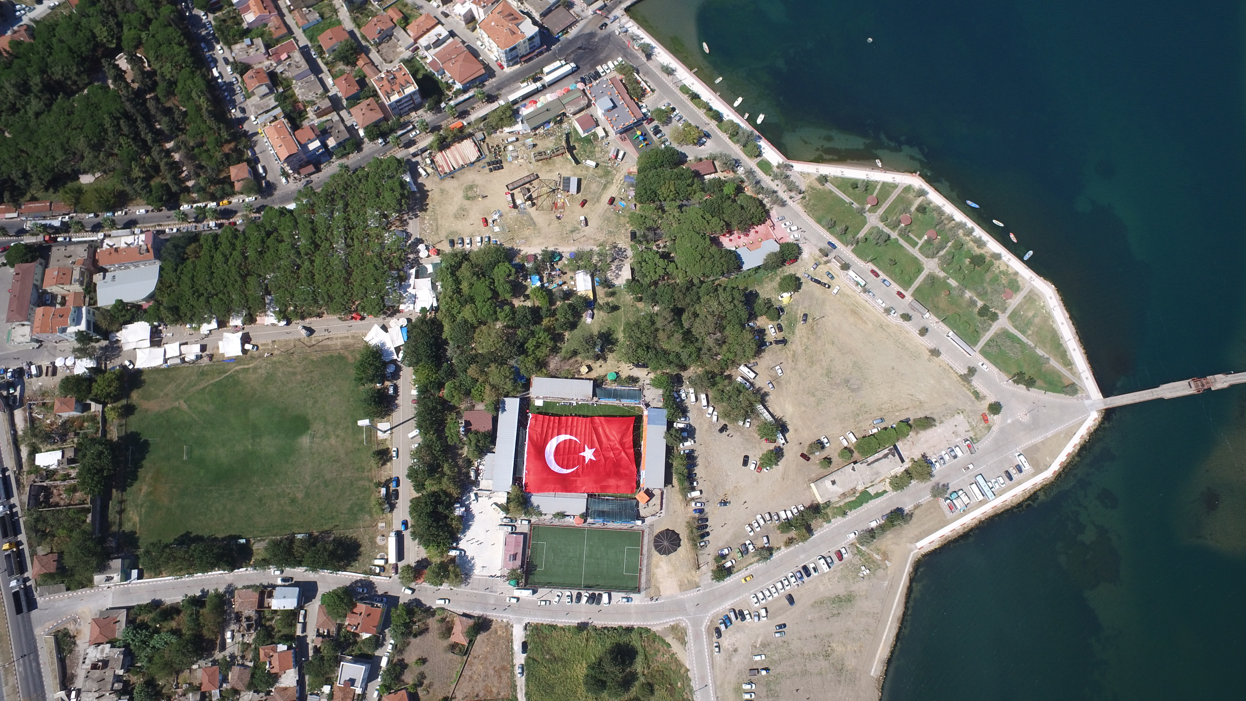 Çardak Güreşlerinde Açılan Türk Bayrağı